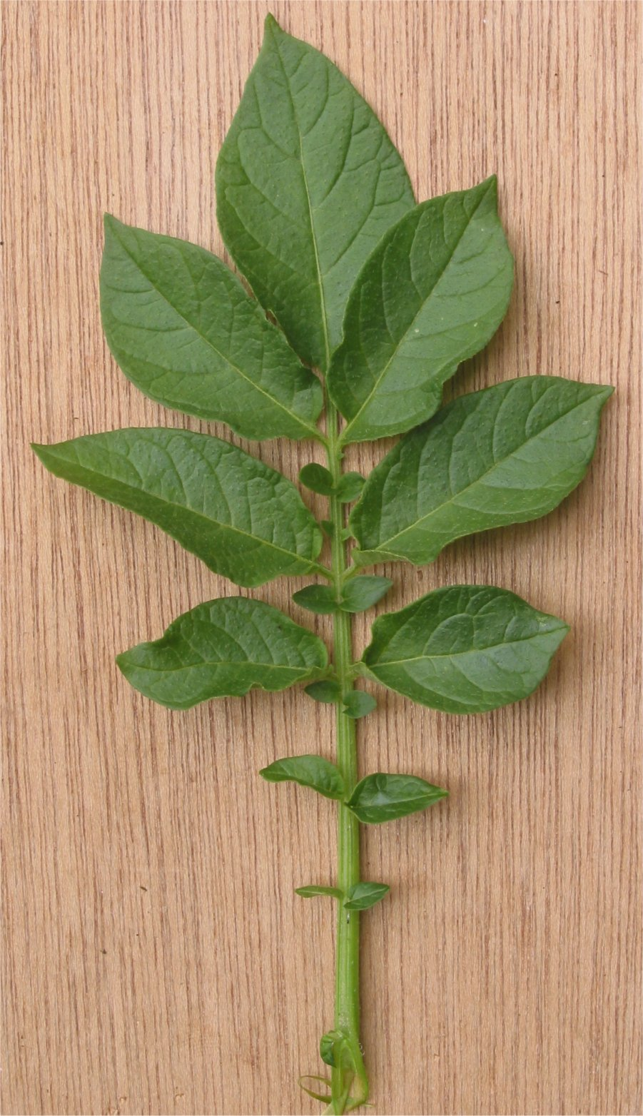 (nl: Aardappel blad) Solanum tuberosum leaf